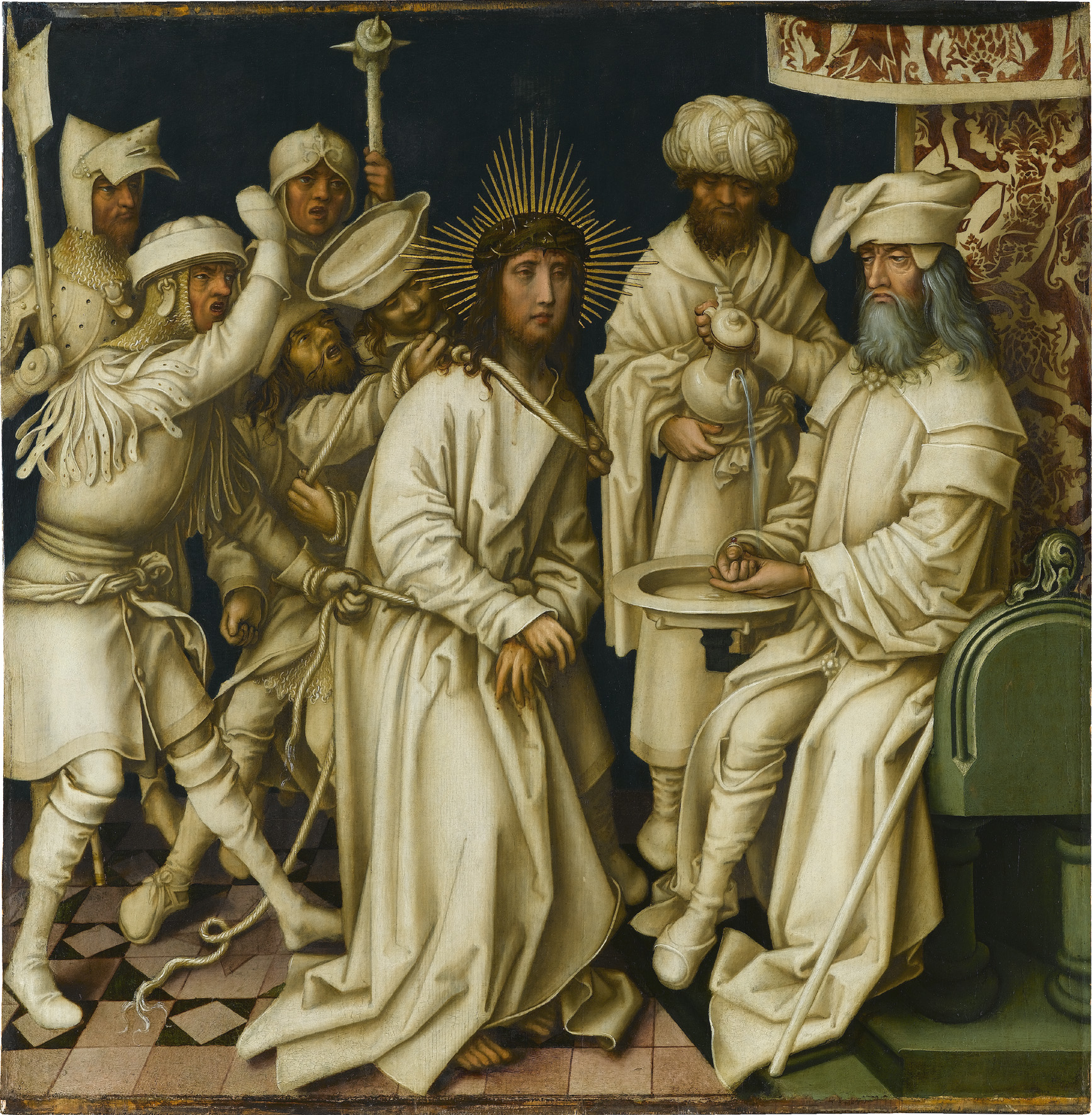 Hans Holbein d.Ä, Graue Passion, Christus vor Pilatus, zwischen 1494 und 1500